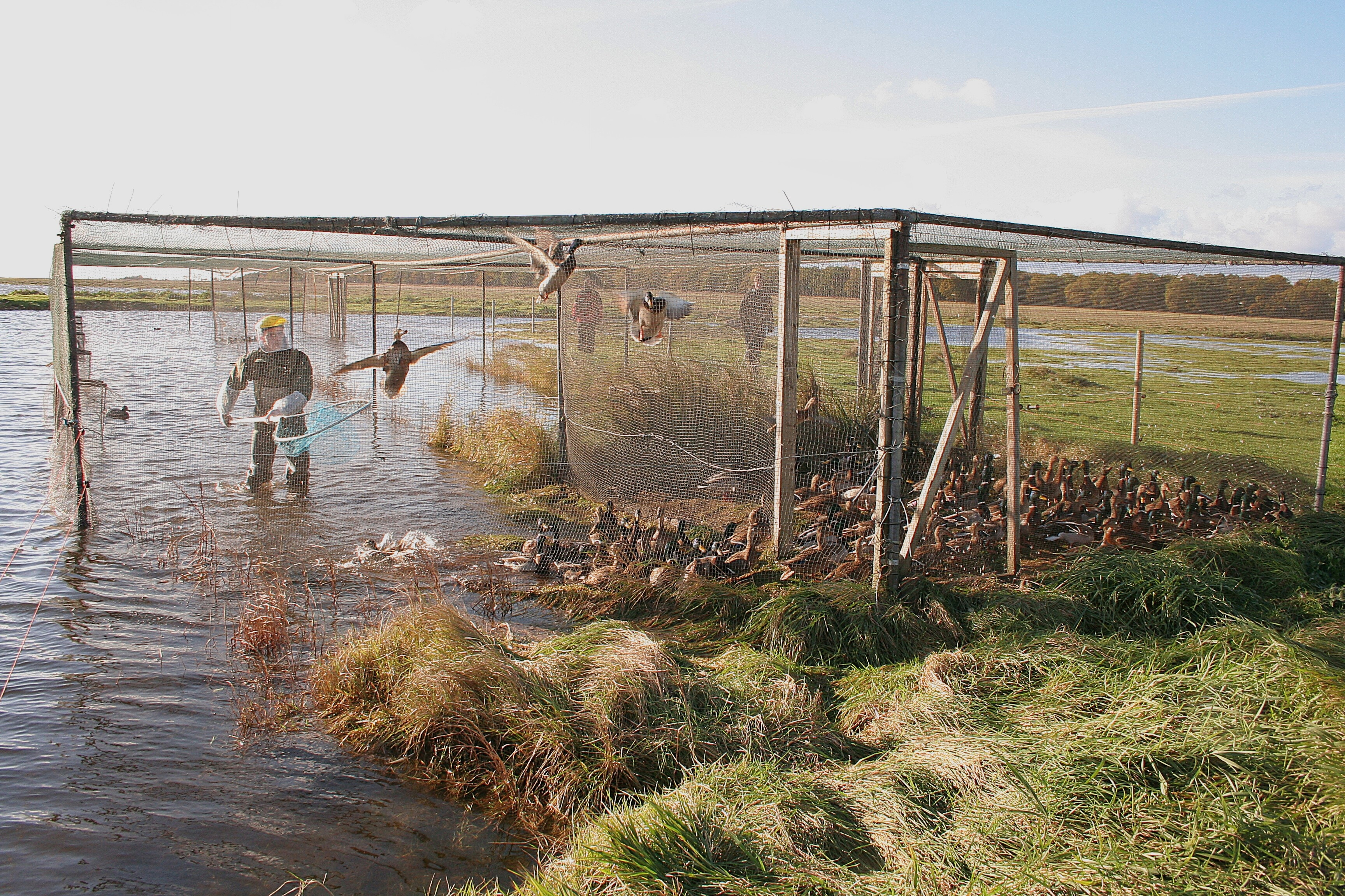 Ottenby andfänge, fångst i samband med ringmärkning